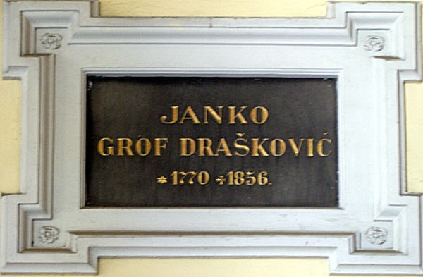 grob Janka Draškovića na zagrebačkom Mirogoju